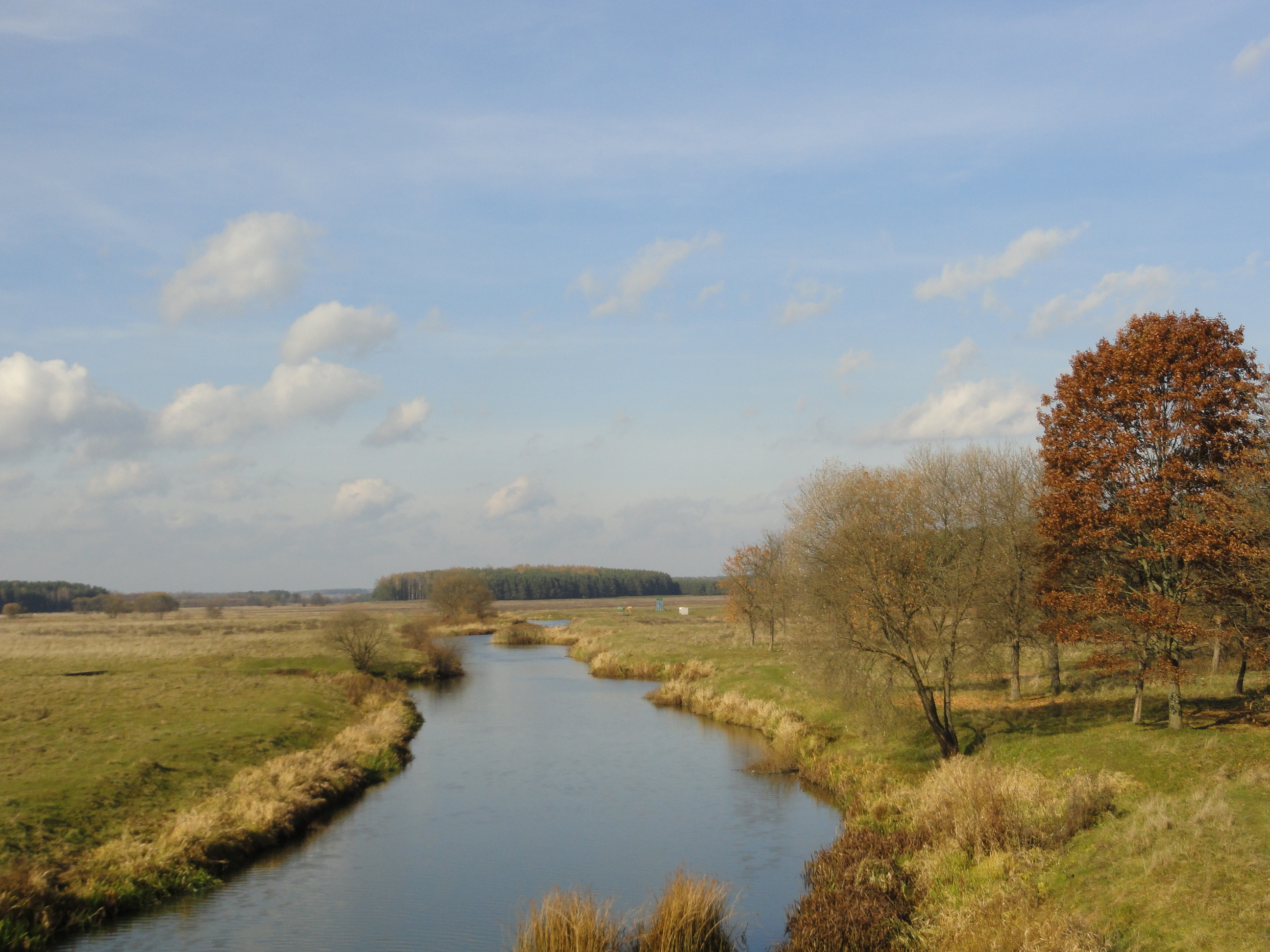 Друть. Вид с моста между Белыничами и Задруцкой Слободой.